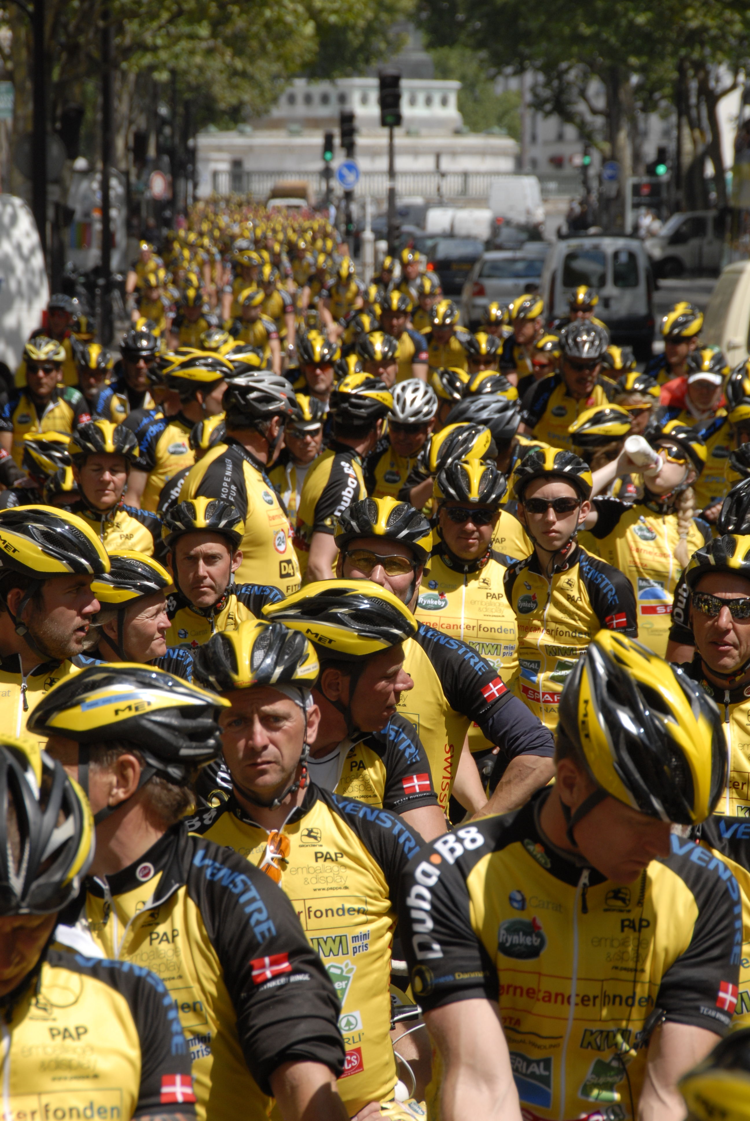 Team Rynkeby tæt på målet i Paris 2011